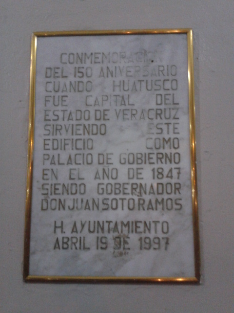 Placa conmemorativa del 150 aniversario, cuando el palacio municipal sirvió como inmueble que albergo los poderes del estado.